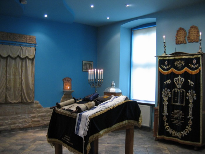 Synagogue in Bielsko-Biała